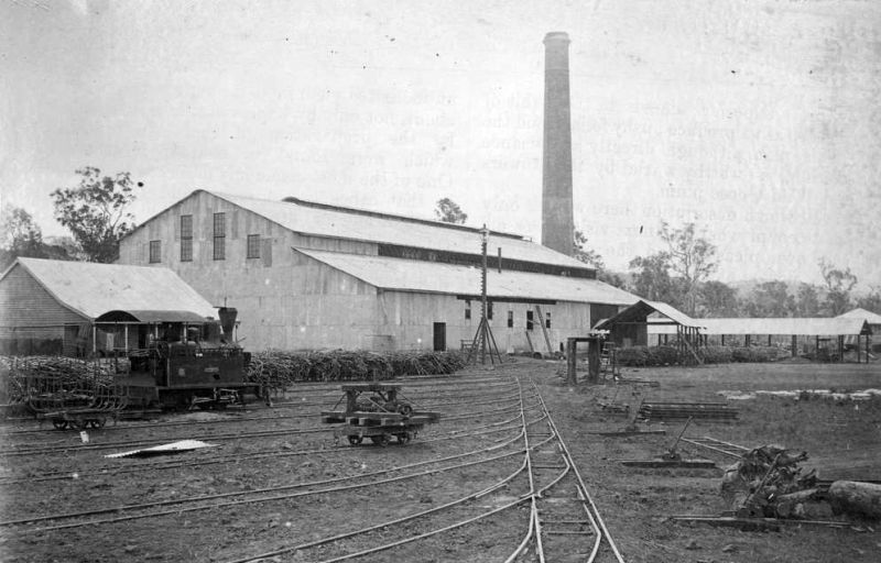 Couillet (Decauville) locos bought by CSR for Homebush Mill. c1883 from the Brandon Collection. (John Oxley library No 6298-0001-0063r)